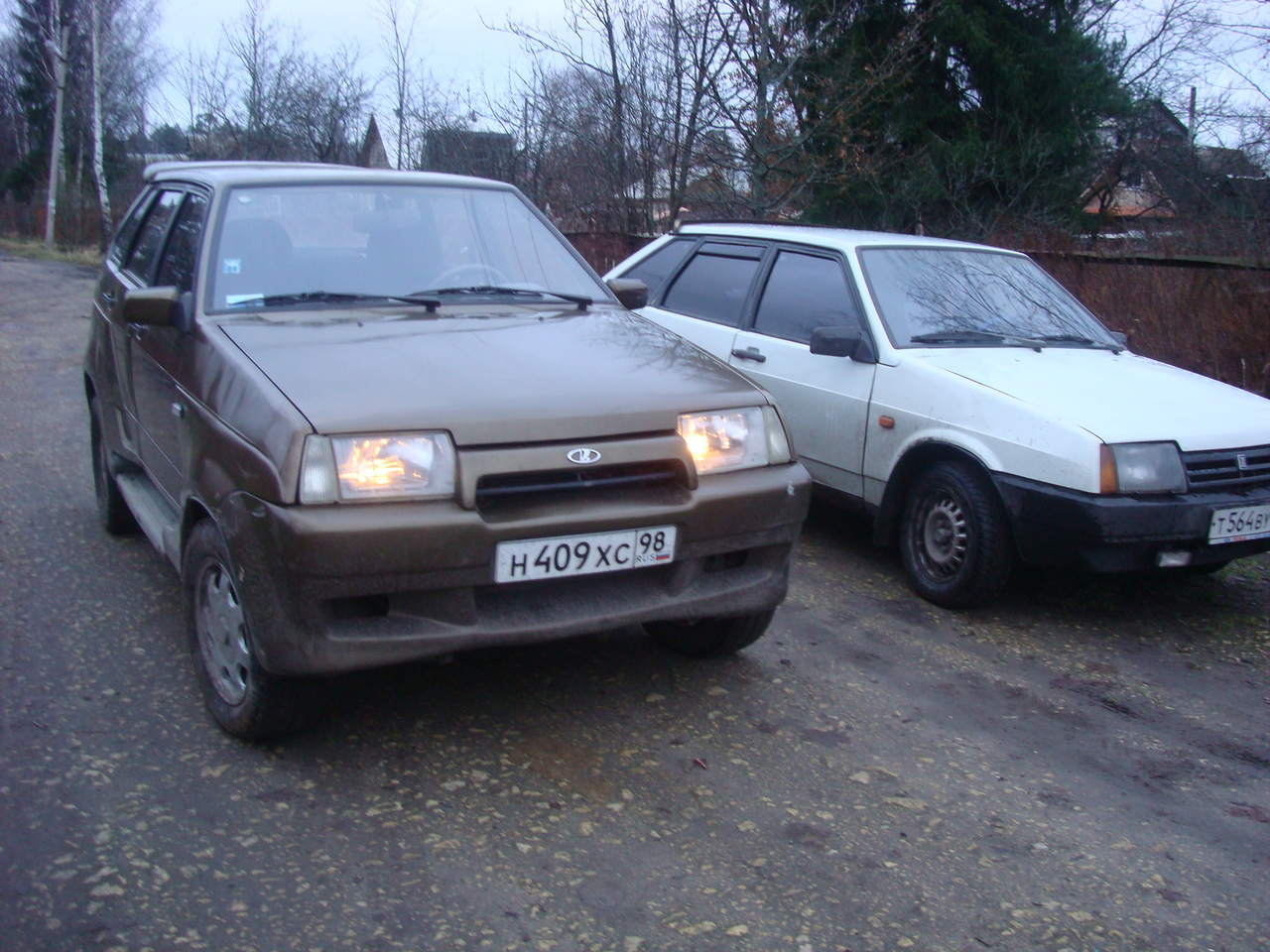 ВАЗ-210934 рядом с ВАЗ-2109.